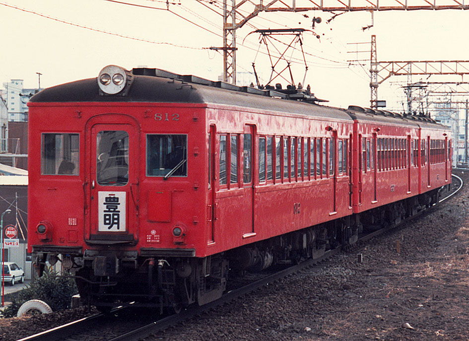 名古屋鉄道 812